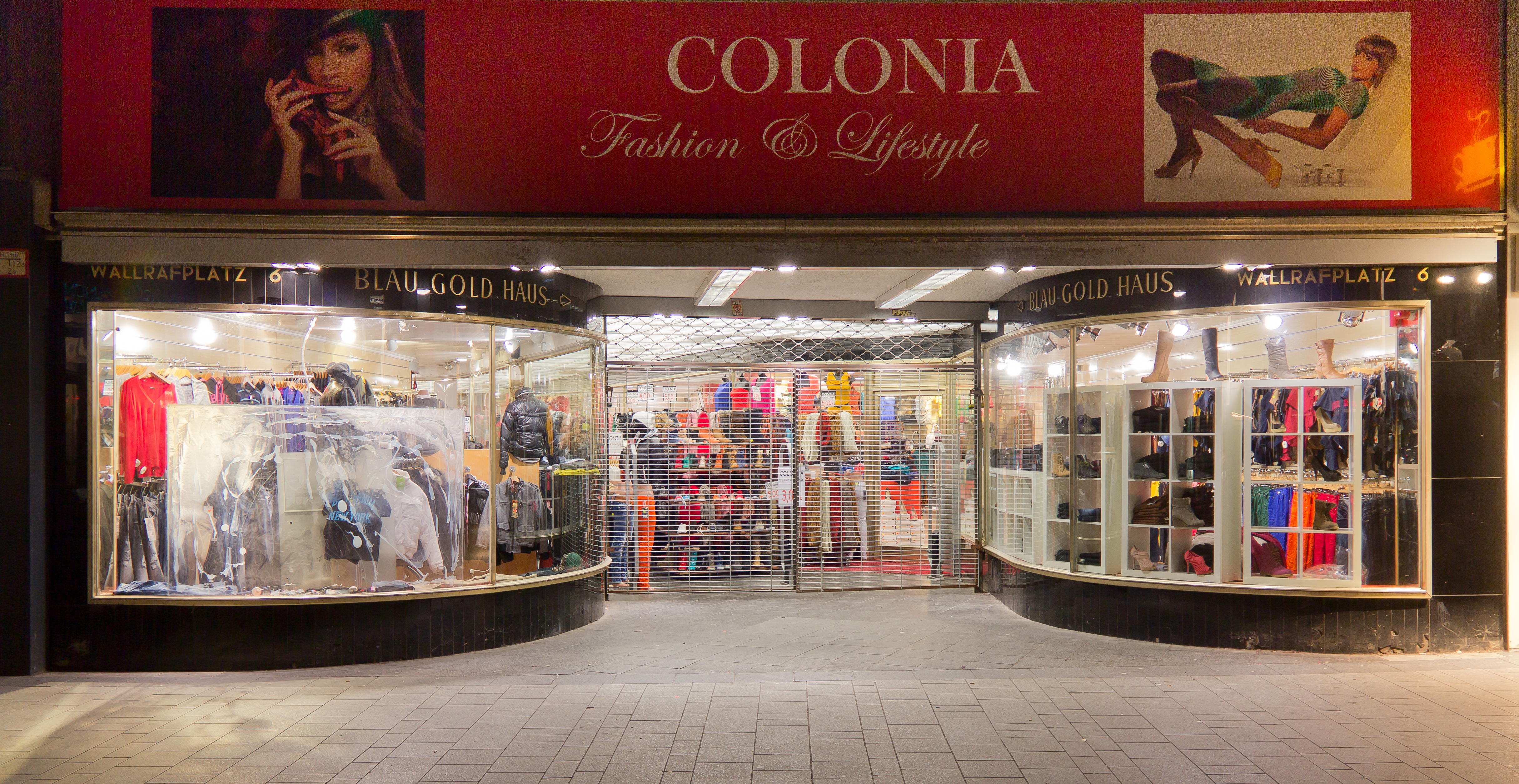 Denkmalgeschützte Passage mit Flachdach „Kristall-Passage“. Durchgang zum Blau-Gold-Haus. Architekt: Wilhelm Koep, Baujahr: 1952 Die historische Schaufensteranlage wurde Ende 2013 abgerissen und durch eine neuzeitliche ersetzt.